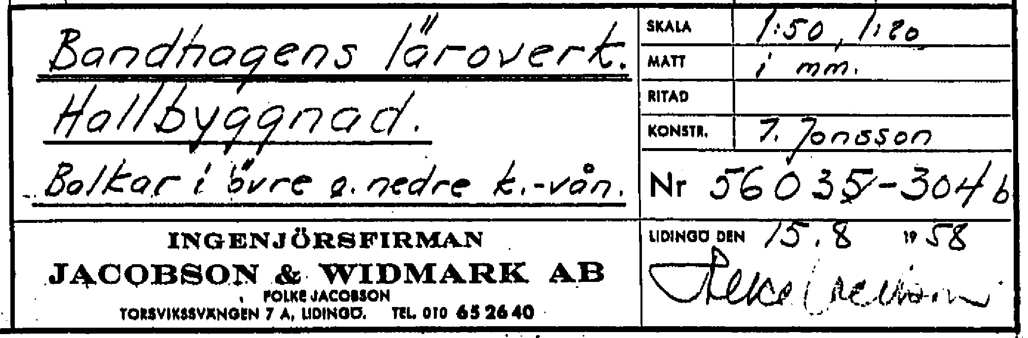 Bandhagens gymnasium J&W:s ritningsstämpel 1958